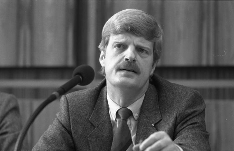 02.02.1983 Professor Dr. Hans-Jürgen Krupp, Manfred Lahnstein und Heinz Westphal legen vor der Bundeskonferenz die SPD-Vorstellungen zur Arbeitsmarkt-Politik dar.